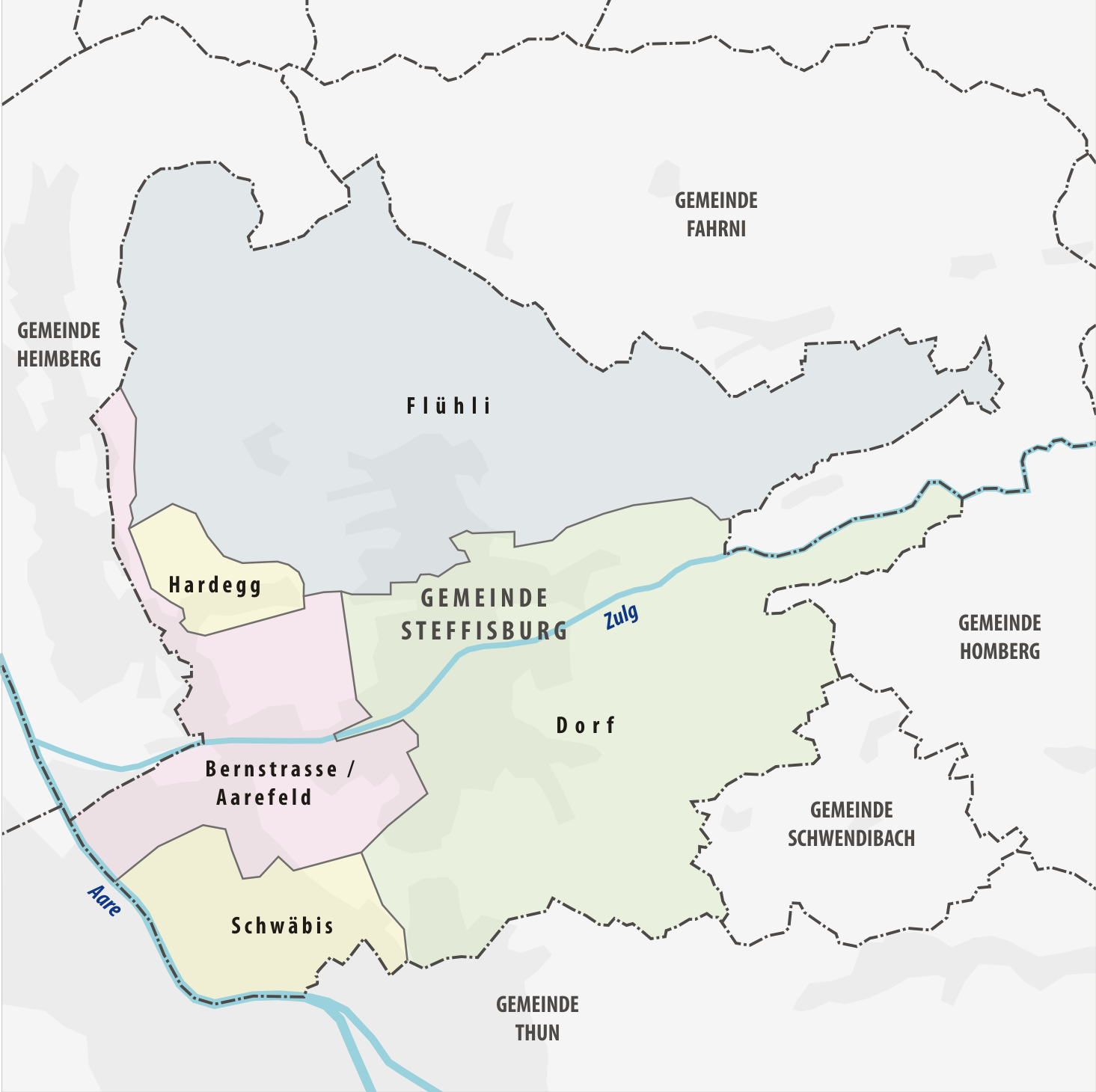 Quartiere der Gemeinde Steffisburg